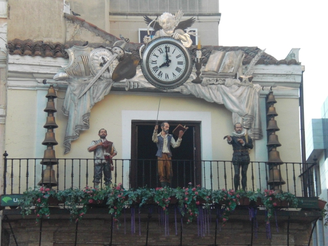 Kariljono de don Kihxoto